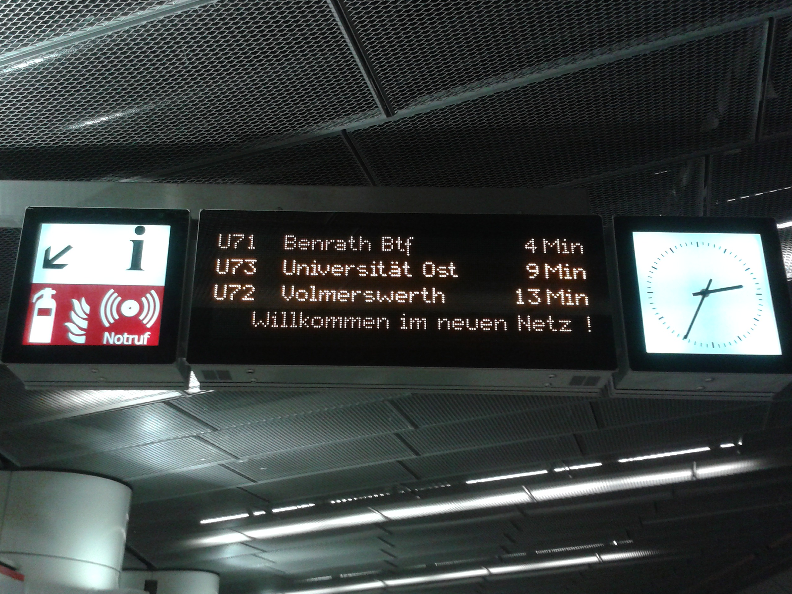 Ein Dynamischer Fahrgastinformationsanzeiger in Düsseldorf